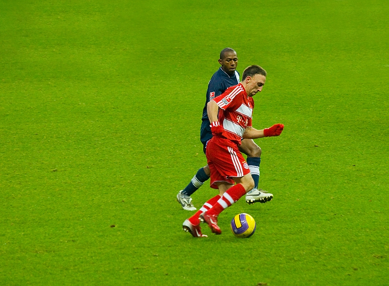 Franck Ribéry beim Spiel der Bayern in Berlin, 15. Dezember 2007.